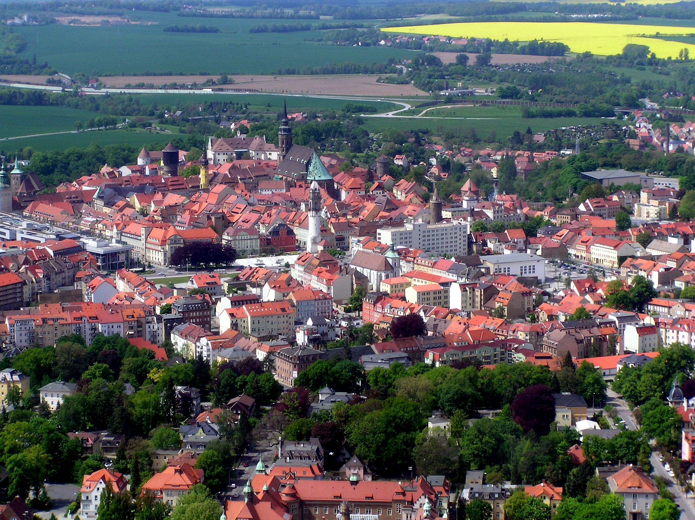 Luftbild der Bautzener Altstadt mit St. Petri Dom, Reichenturm, Wasserturm, Ortenburg, Kornmarktcenter, Stadtgebäuden und nordwestlichem Umfeld Hornjoserbsce: Lětarski wobraz Budyskeho stareho města z katedralu swj. Pětra, Bohatej wěžu, Wodowej wěžu, hrodom a centerom na Žitnych wikach.